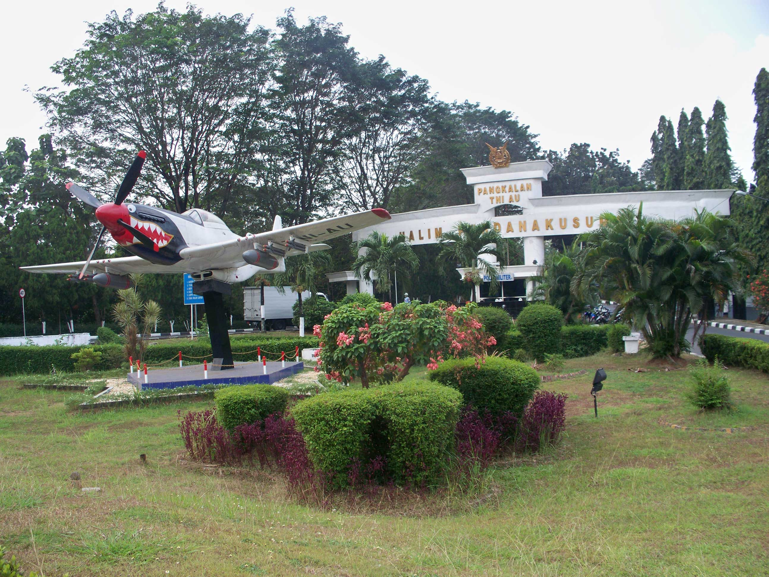 Pangkalan TNI AU Halim